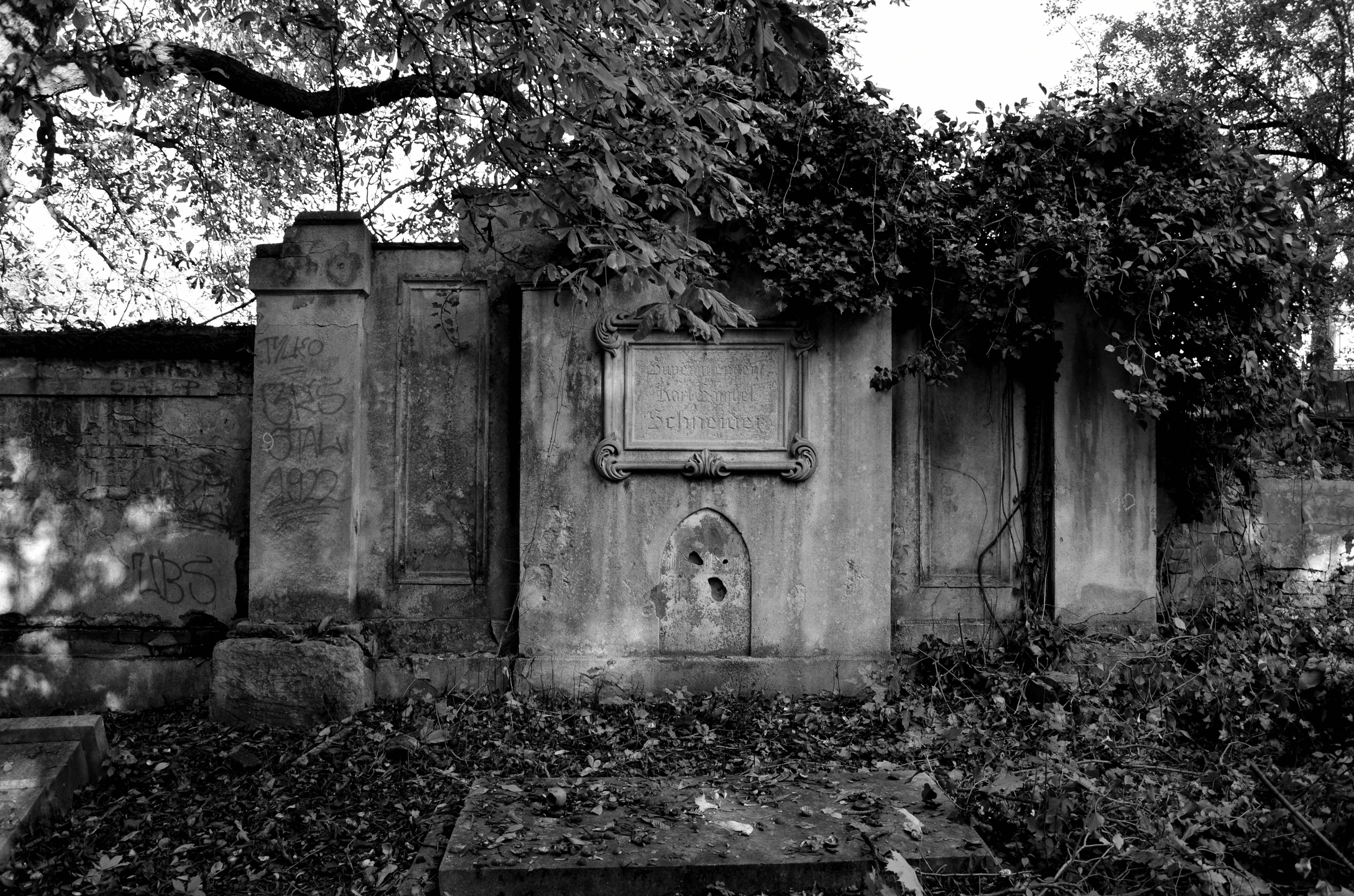 Geschändetes Grabmal von Karl Samuel Schneider